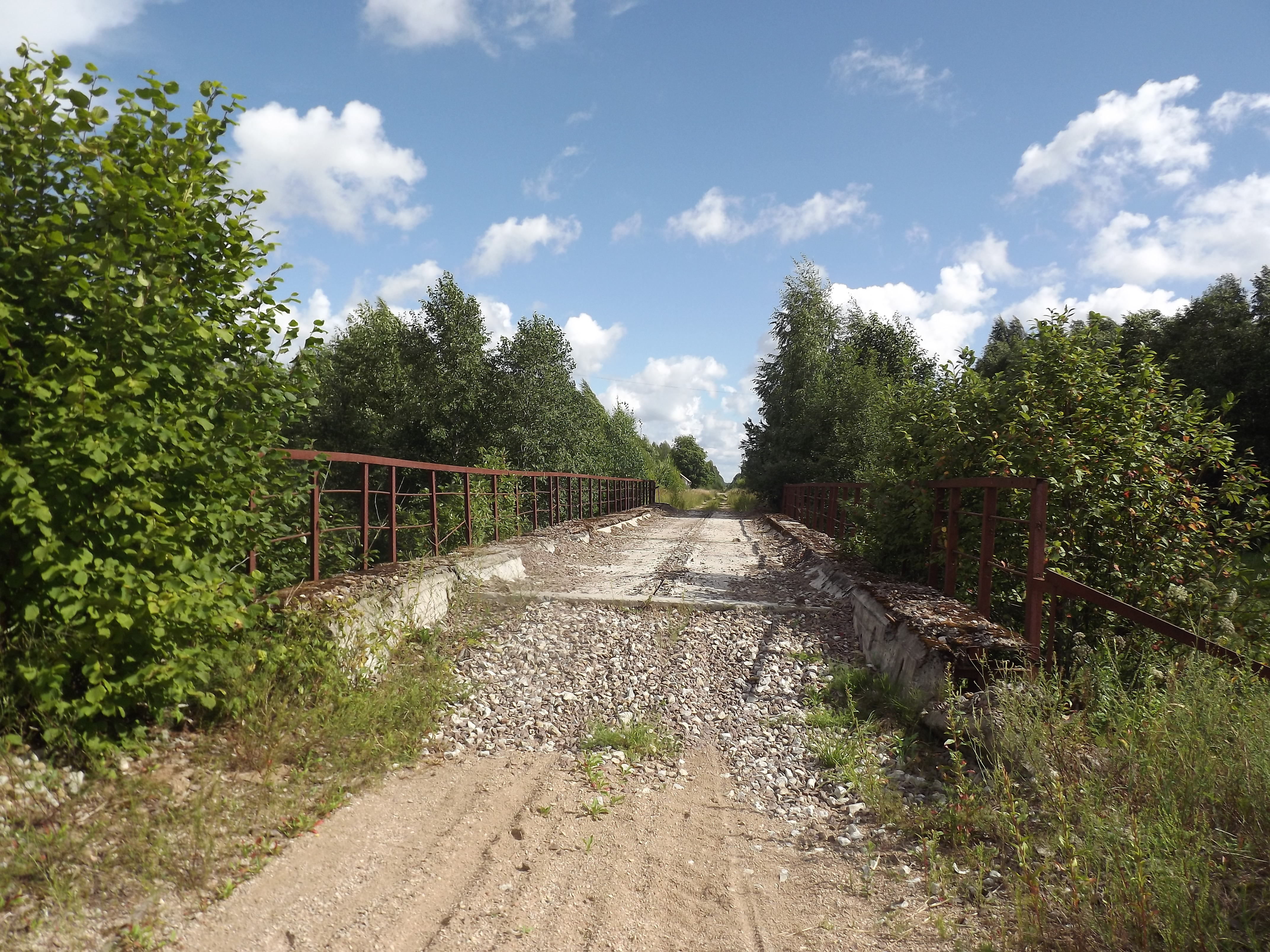 Reiu jõe raudteesild